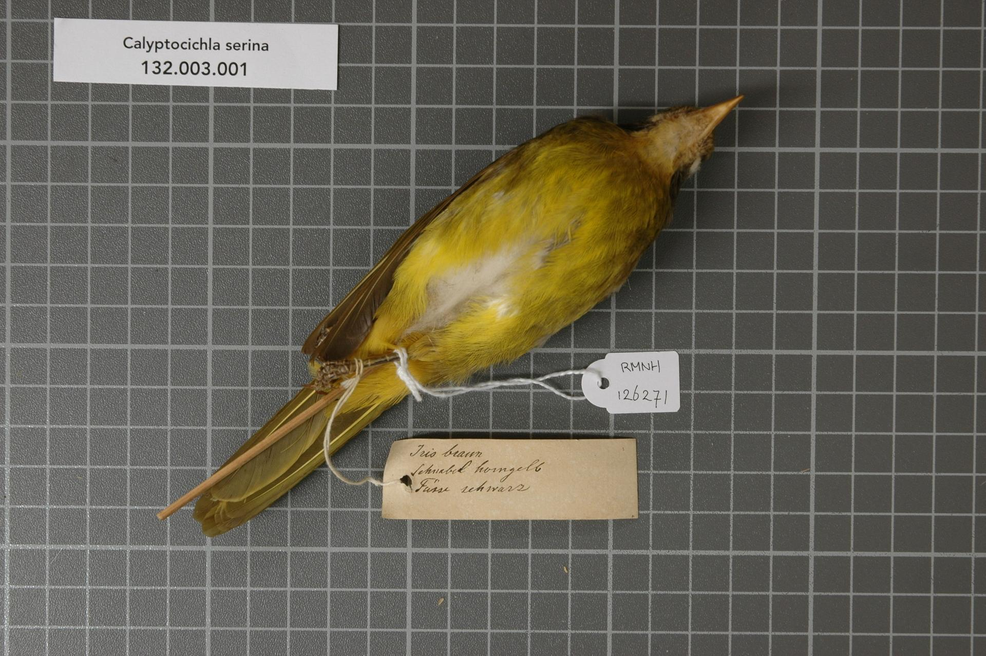 Calyptocichla serina (J. & E. Verreaux, 1855)